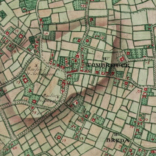 Tombrouck - Hameau partagé entre Luingne (Mouscron) et Rollegem (Courtrai) en Belgique sur la Carte de Cabinet des Pays-Bas autrichiens. La carte de Cabinet des Pays-Bas autrichiens a été levée sous la direction du comte de Ferraris entre 1770 et 1777. Il s'agit d'un document militaire réalisé en trois exemplaires et dont l'échelle originale est 1 / 11 520. La carte est entièrement manuscrite et procède de levers sur le terrain.